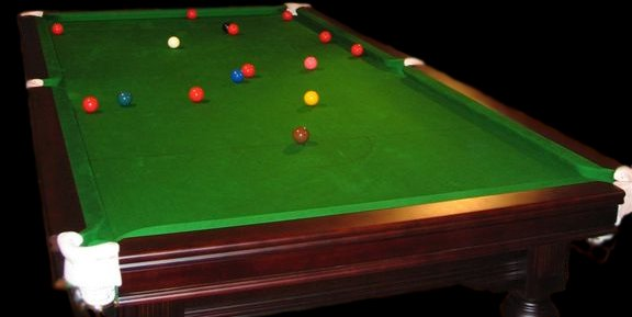 Vue d'une partie de Snooker Photo de Utilisateur:Jgremillot, 2005.